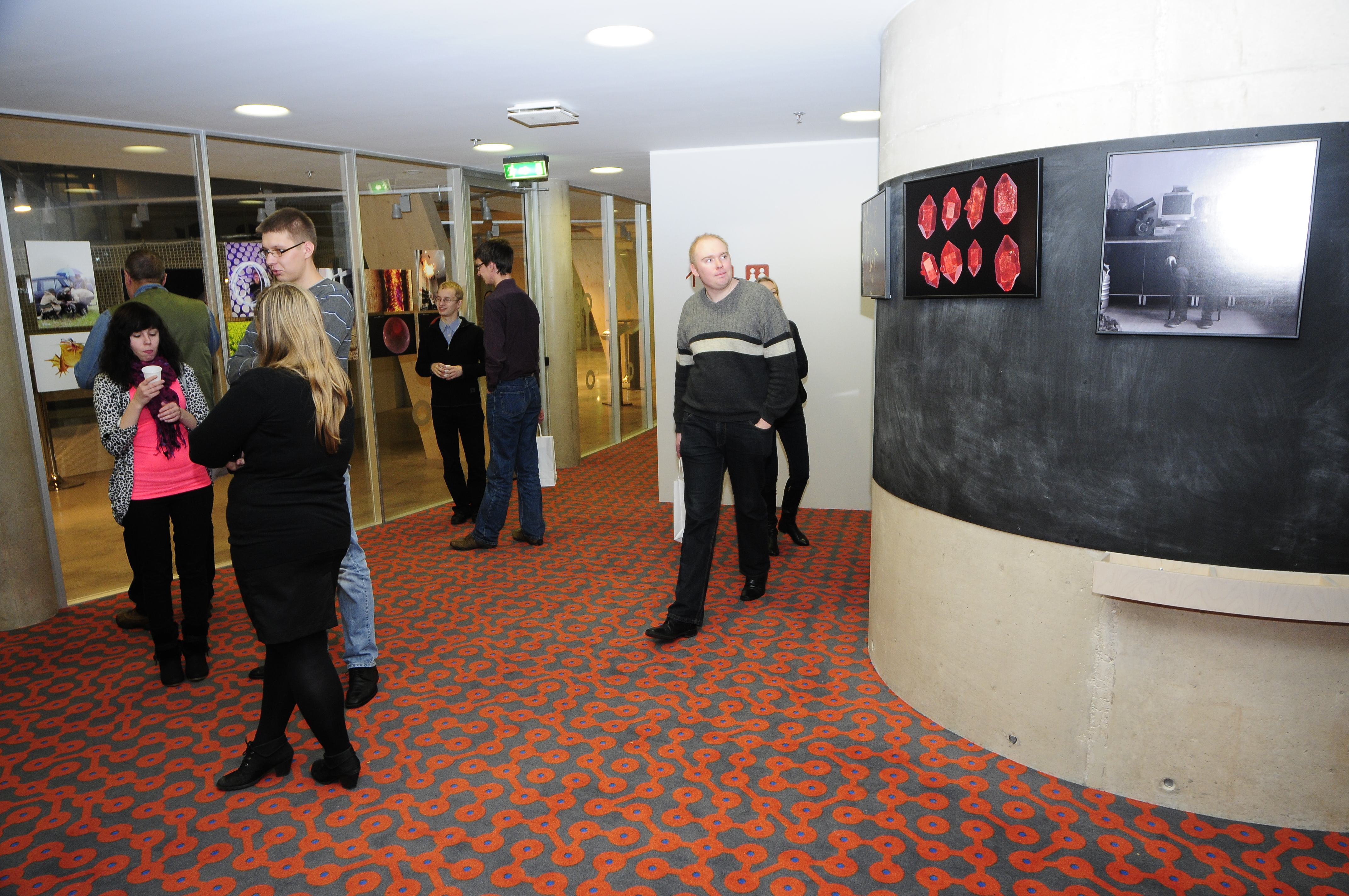 Teadusfoto näituse avamine.